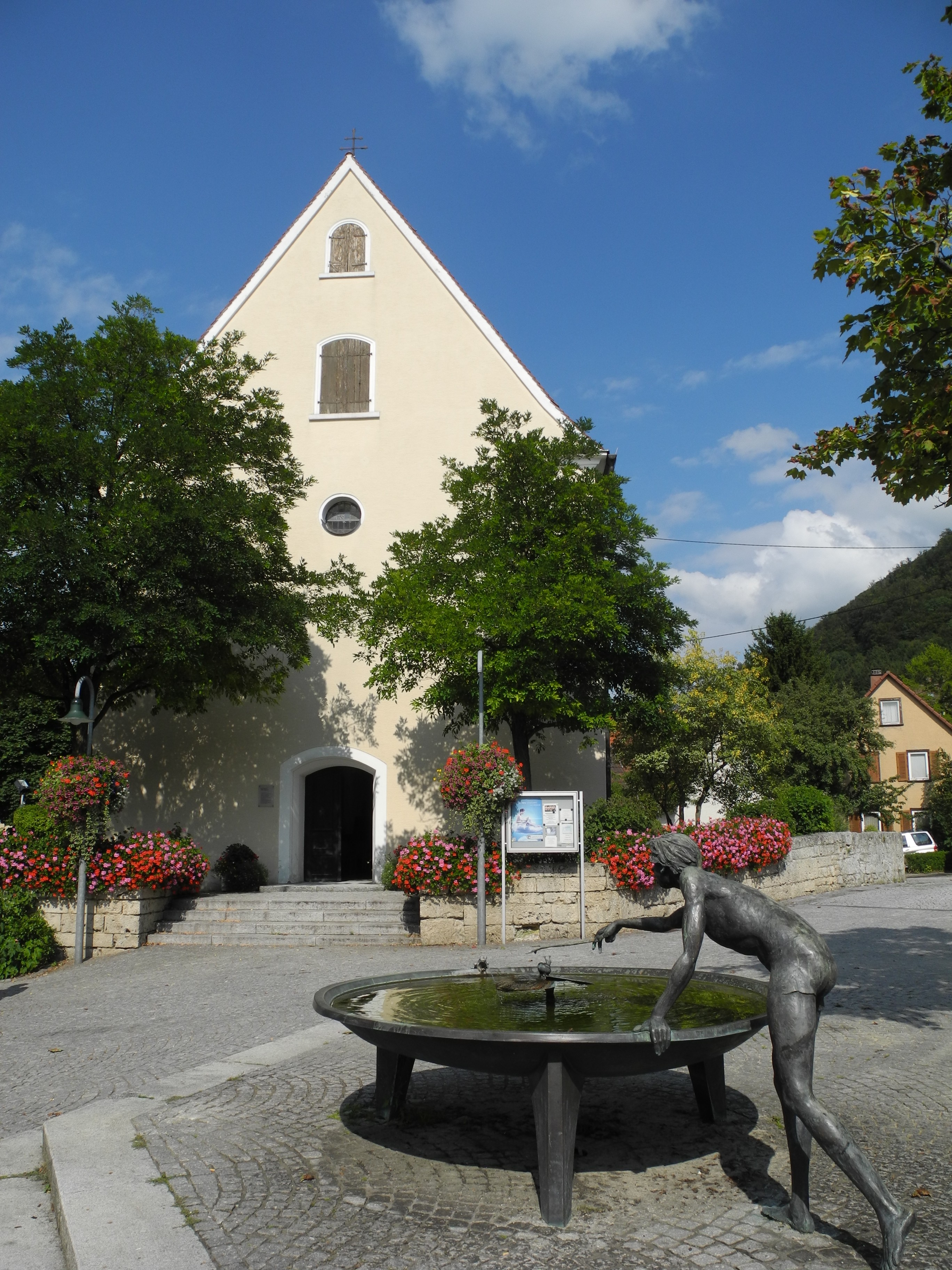 Bad Ditzenbach - Alte Dorfkirche St. Laurentius ab 1707, Brunnen